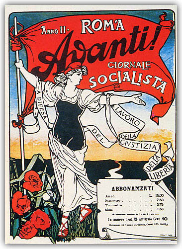 Manifesto di propaganda dell' Avanti!, quotidiano del Partito Socialista Italiano nel 1897